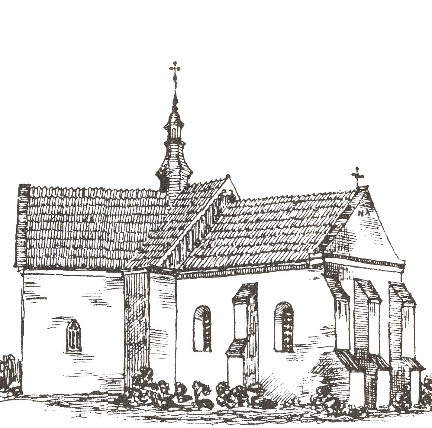 rysunek Jana Wiśniewskiego przedstawiający kościół w Chlewiskach (pow. szydłowiecki) stan z 1912 r.